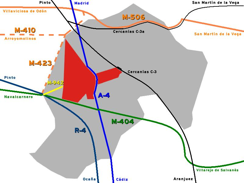 Esquema de Transportes en Valdemoro